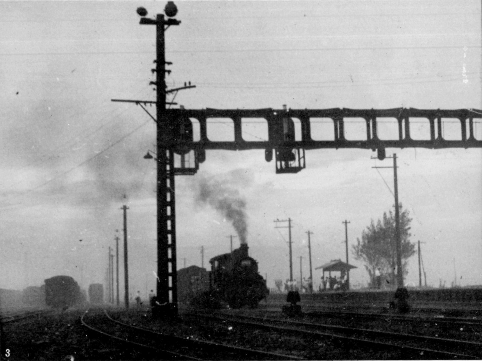 昭和21年頃の関西本線久宝寺駅。